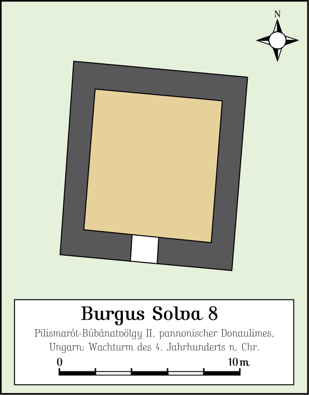 Burgus Solva 8, Esztergom-Búbánatvölgy II, Ungarn, Wachturm des 4. Jahrhunderts n. Chr. Quelle: Zsolt Máté (Hrsg.): Frontiers of the Roman Empire – Ripa Pannonica in Hungary (RPH), Nomination Statement, Vol. 2, National Office of Cultural Heritage, Budapest 2011, S. 259.